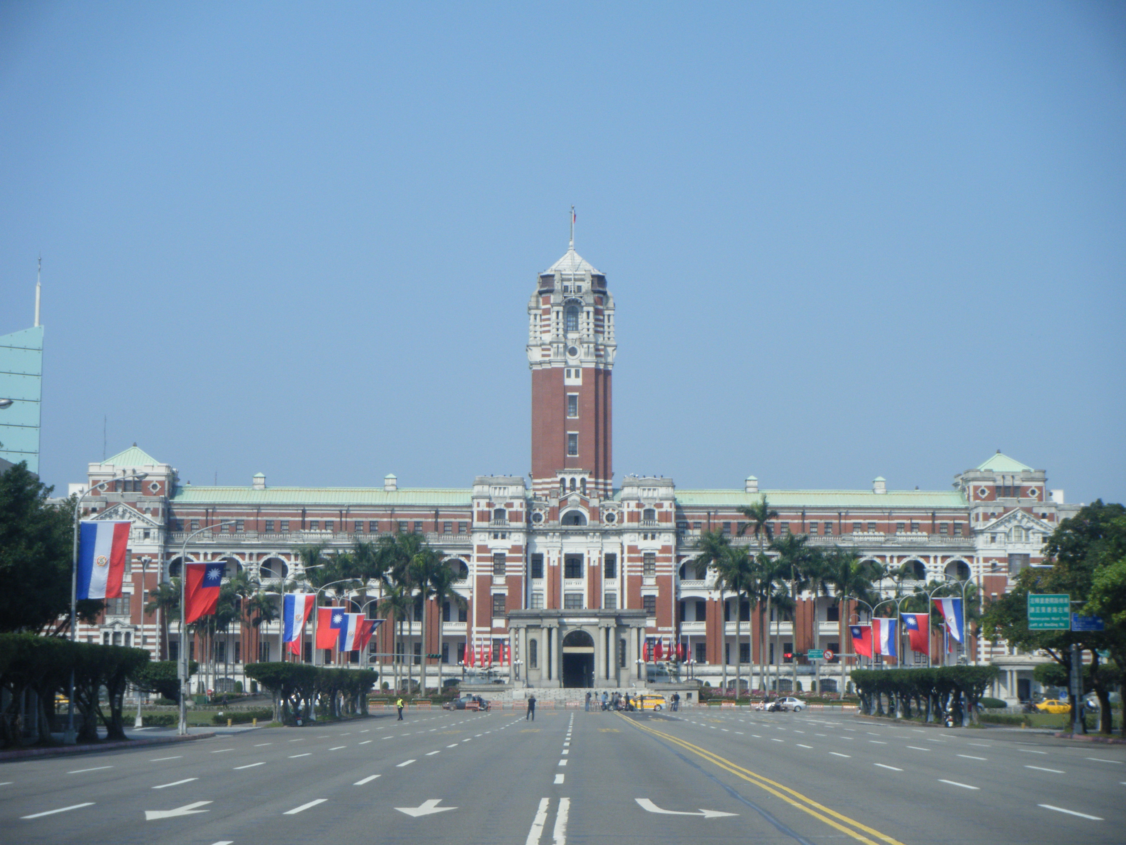 中華民國總統府。 Bân-lâm-gú: Tiong-huâ Bîn-kok Tsóng-thóng-hú.